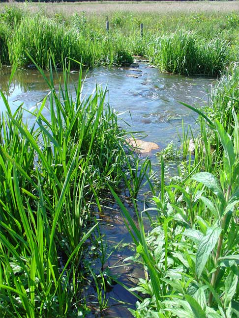 Voorde in het Deurzerdiep (Ford in the "Deurzerdiep" near Rolde)